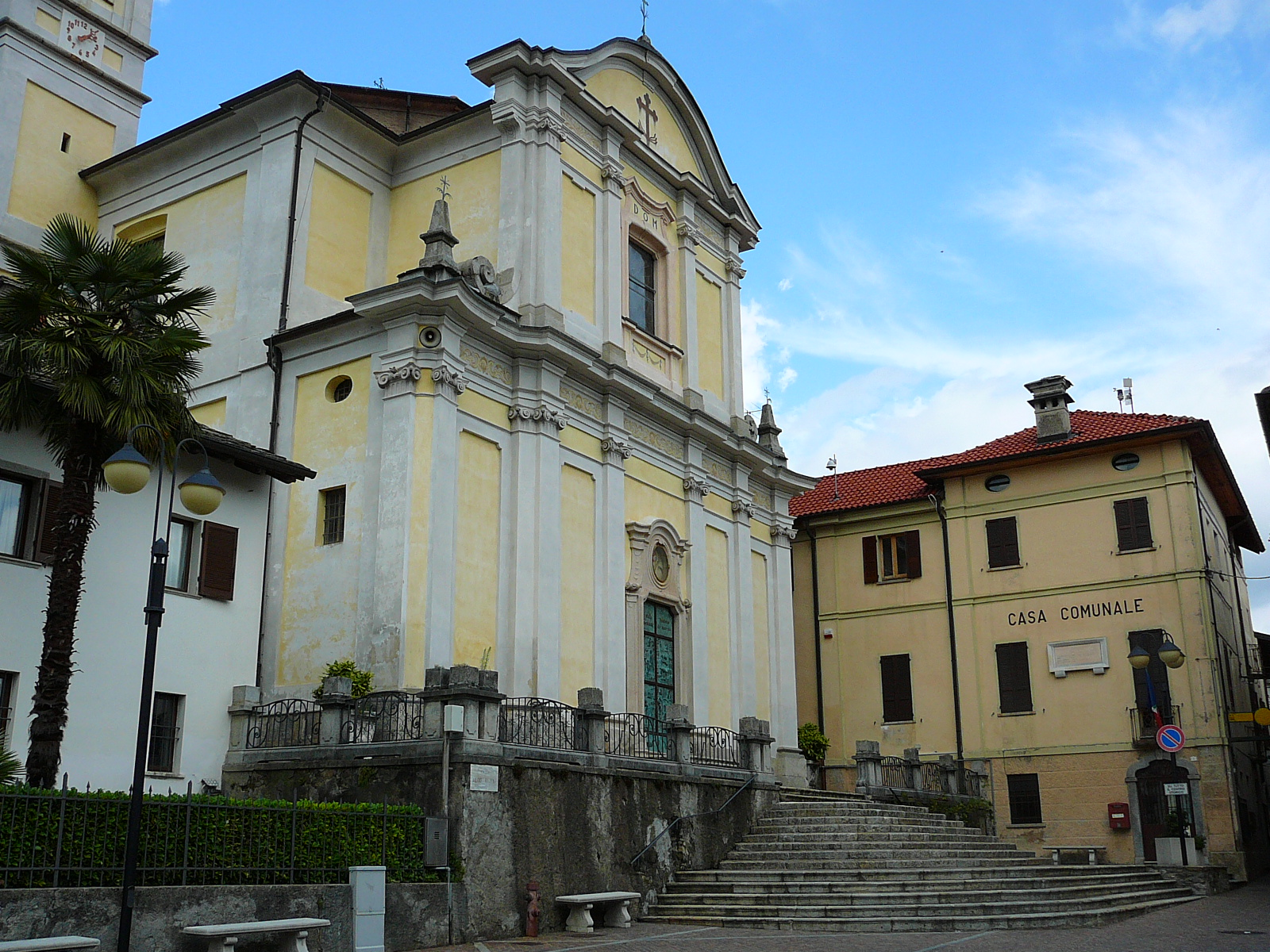 Marzio (VA) - chiesa e municipio